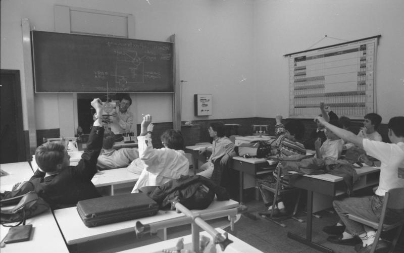 Juni 1988 Bonn: Gymnasium - Physik Unterricht